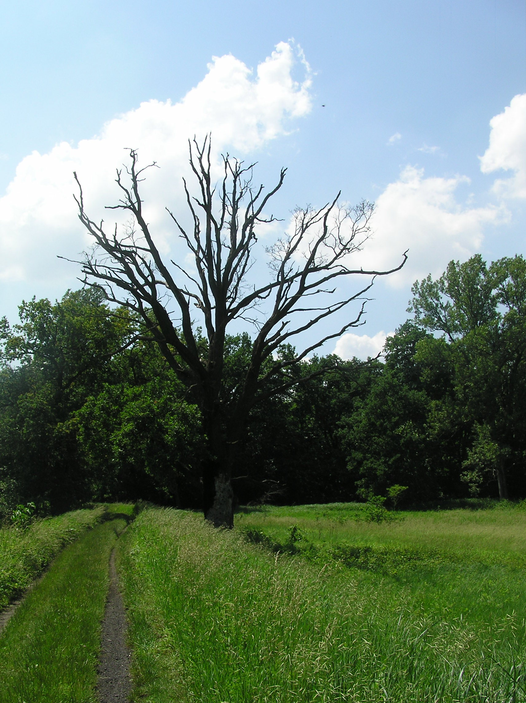 Wrocław, wał rzeki Widawa, Las Sołtysowicki